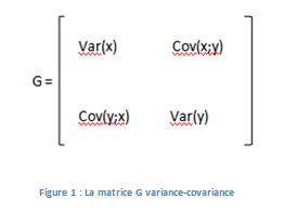 Matrice G variance-covariance